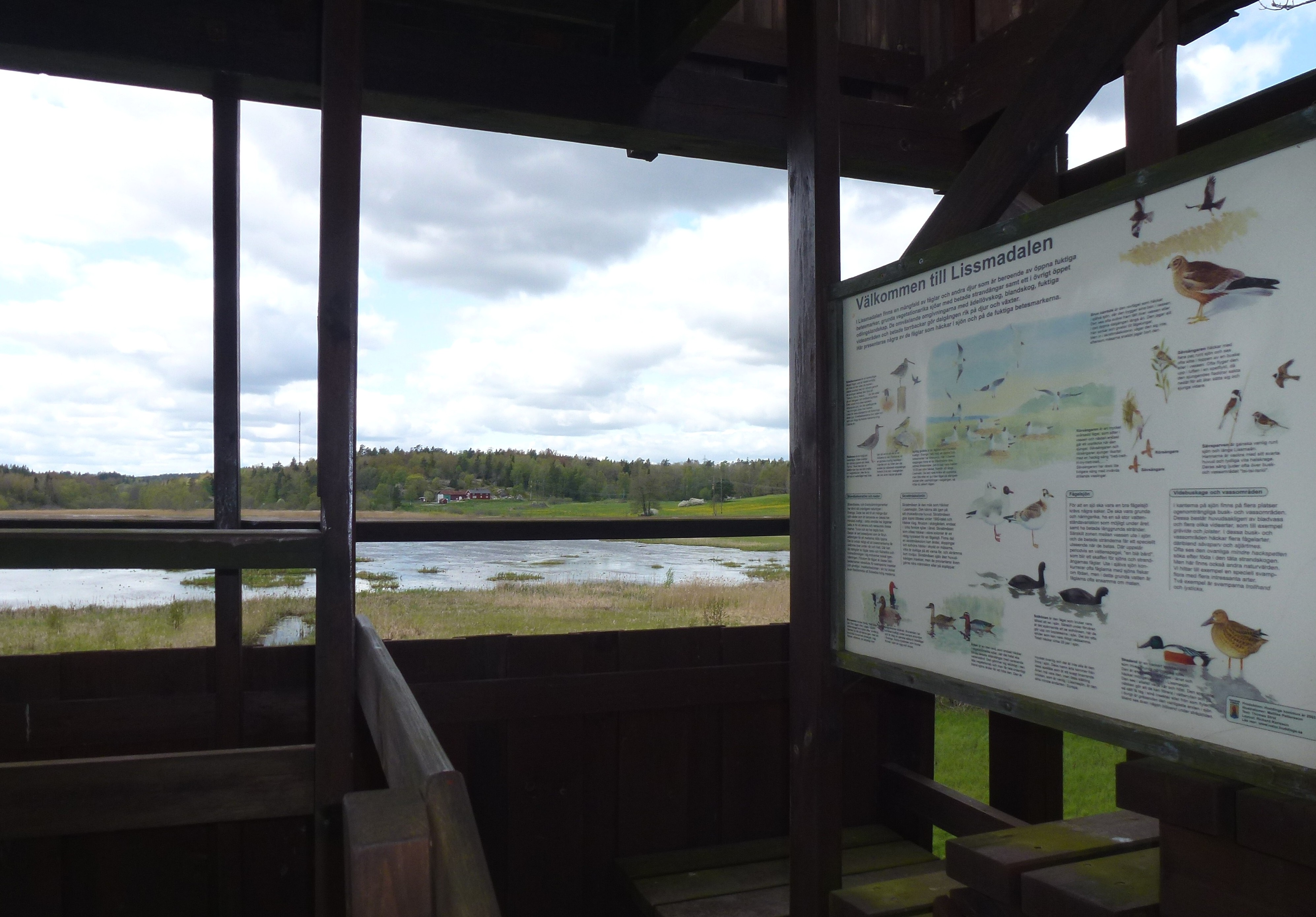 Lissmasjön, fågeltornet med infoskylt